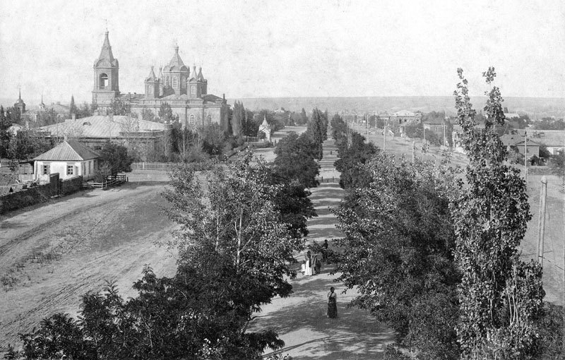 Станица Каменская (до 07.11.1917). Христорождественская церковь и Донецкий проспект.